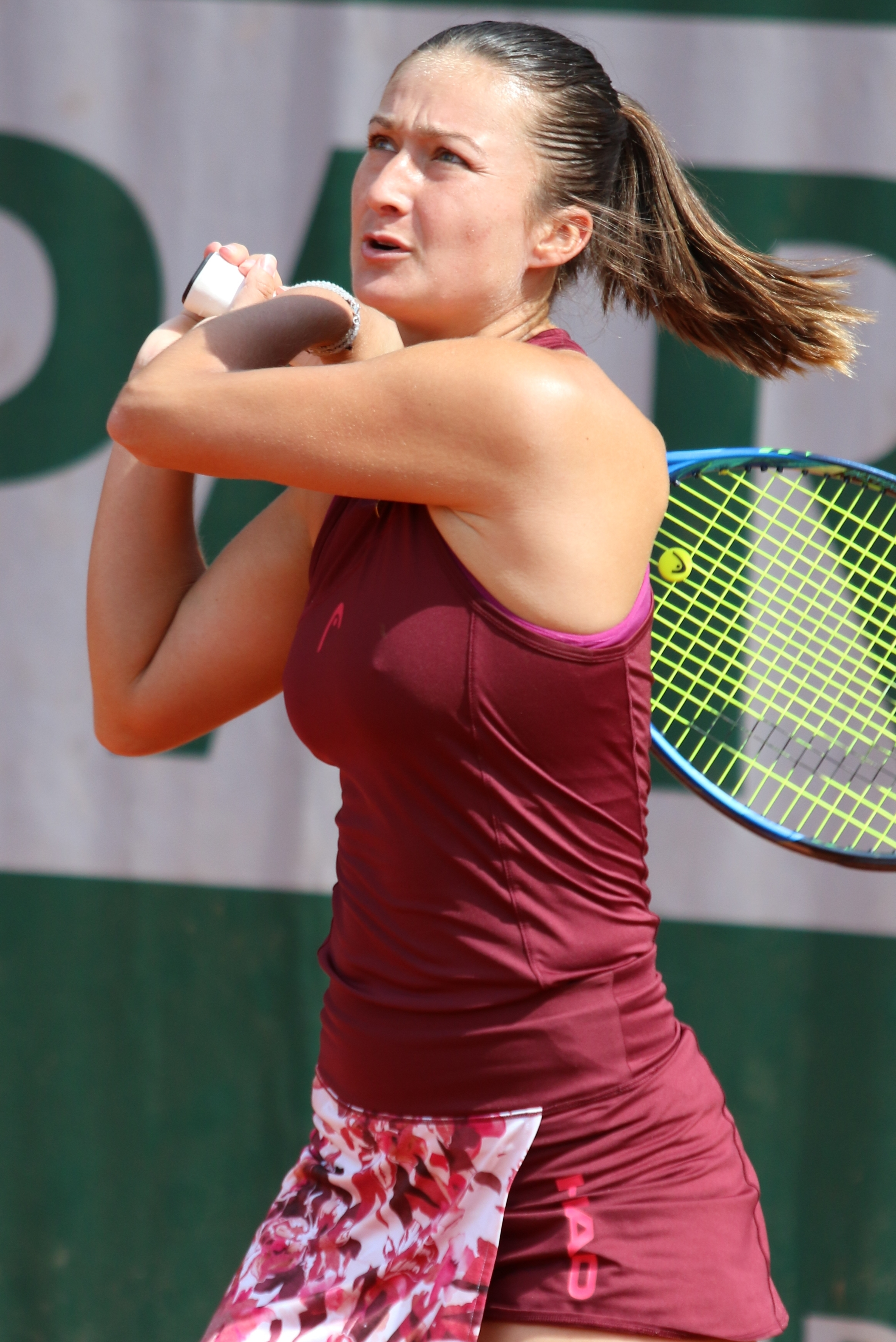 Jakupovic RG18 (1)